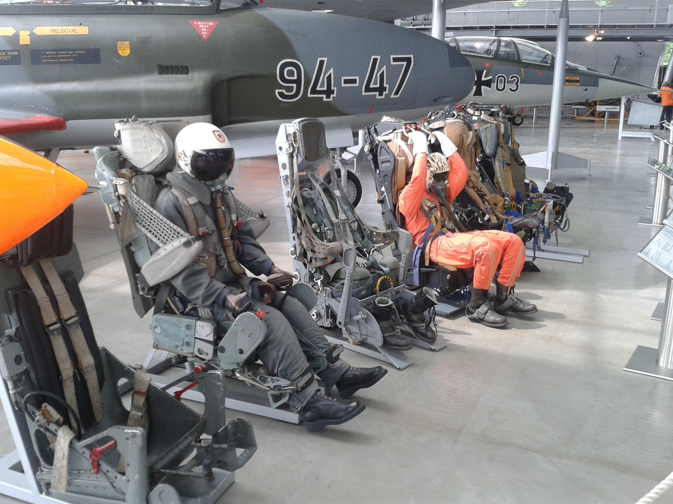 Flugwerft Schleißheim